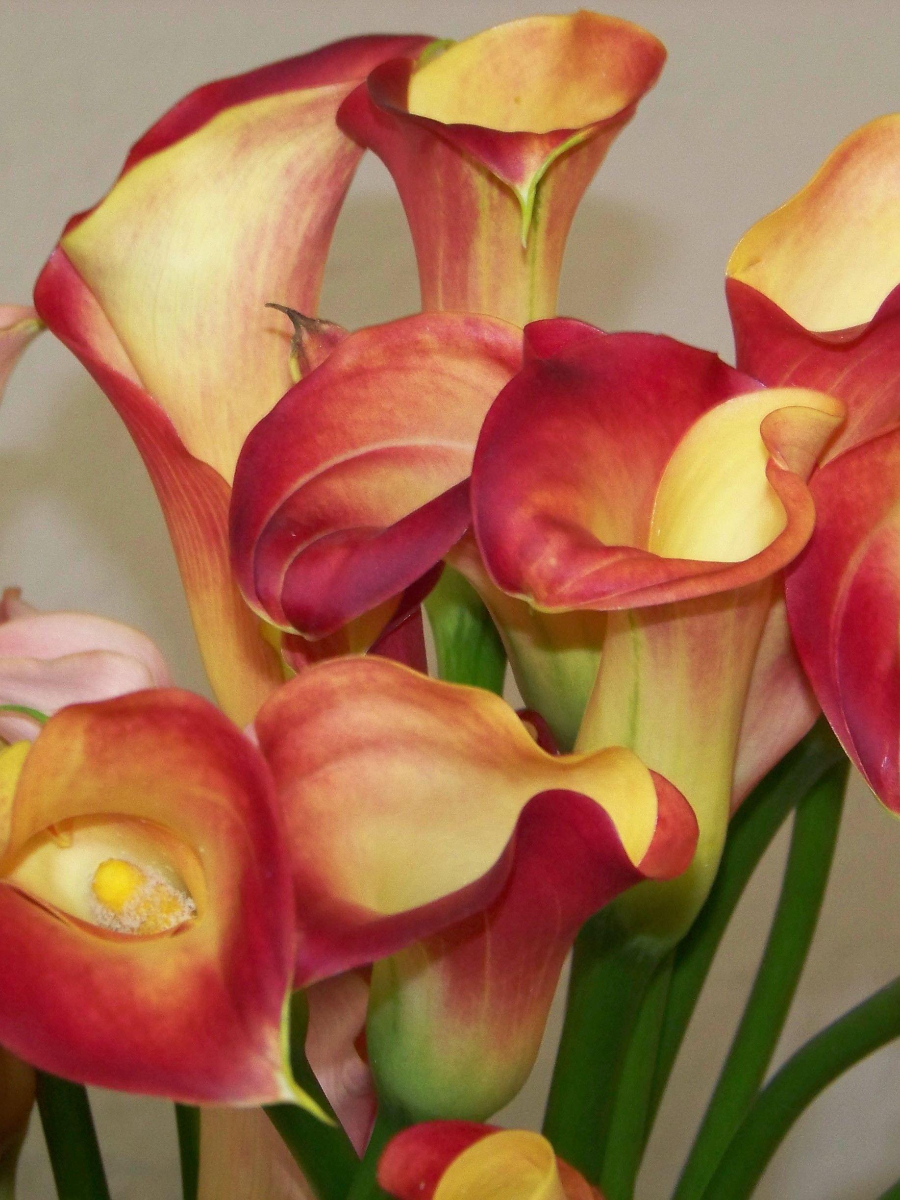 Farbige „Zuchtcalla“ (Zantedeschia spec.)